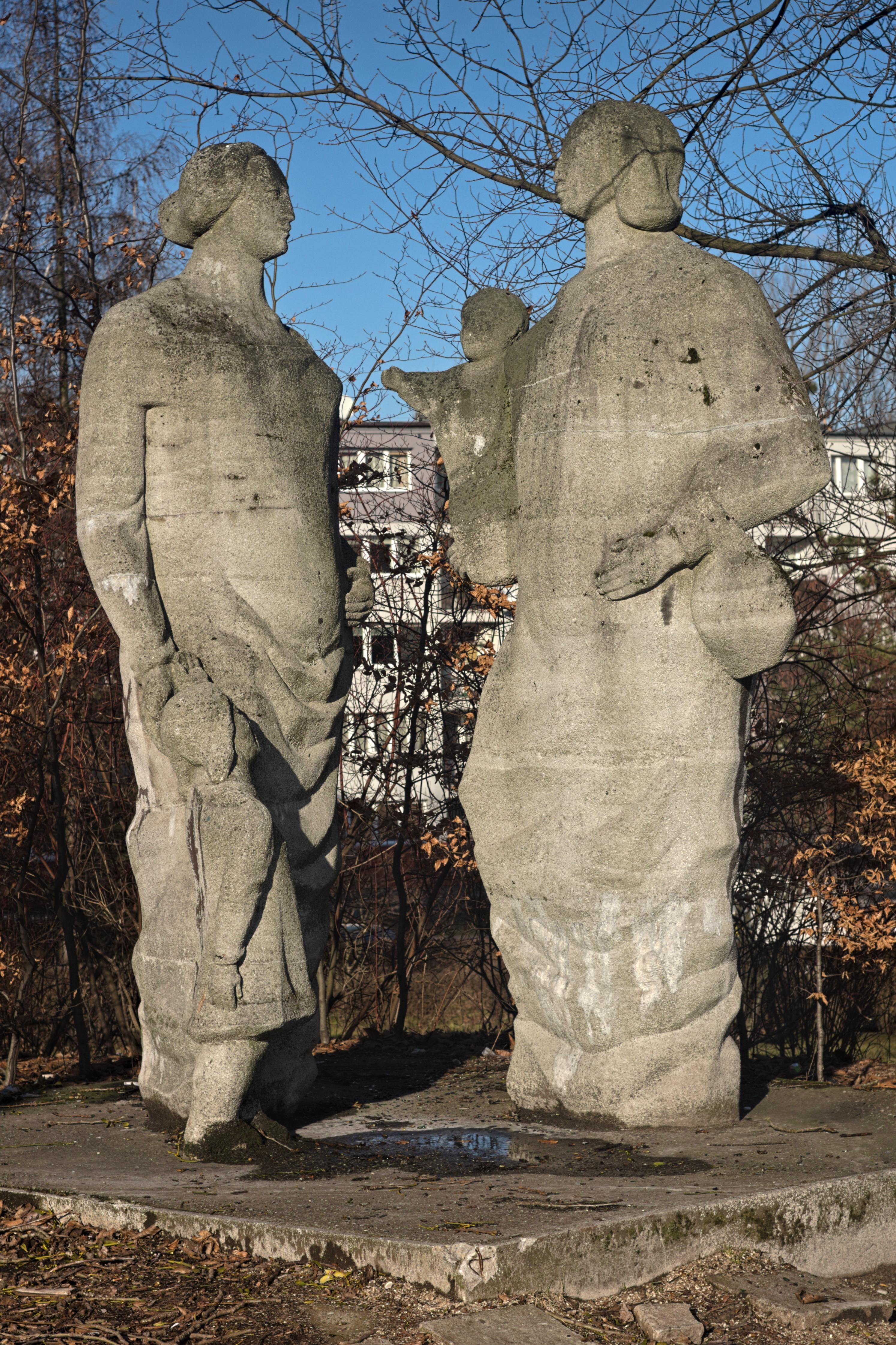 rzeźba „Macierzyństwo” przy ul. Chorzowskiej w Bytomiu, osiedle Arki Bożka; autorzy: Waldemar Madej i Jerzy Kwiatkowski, styl socrealistyczny, datowana na 1978 rok